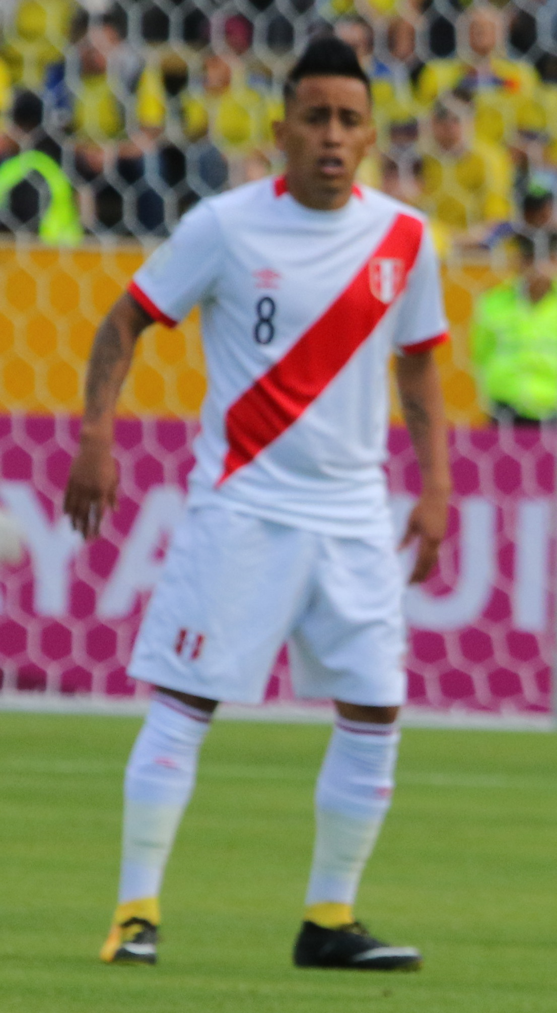 Quito 5 Sep (Andes).- Encuentro por eliminatorias Rusia 2018 entre Ecuador y Perú, Estadio Atahualpa. Fotografías: Carlos Rodríguez/Andes.